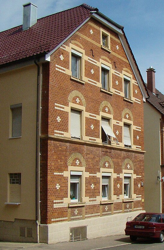 Ausschnitt aus File:Hn-boeck-eppinger68.jpg